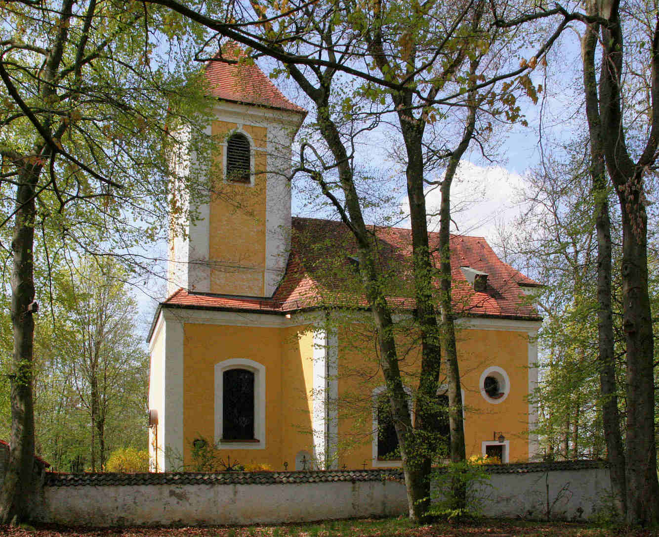 Church St. Anna in München-Harlaching